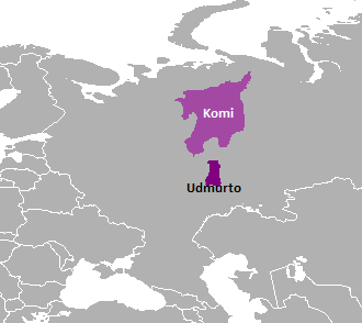 Lenguas pérmicas